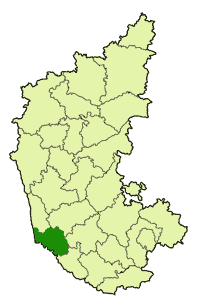 Dakshina Kannada dist